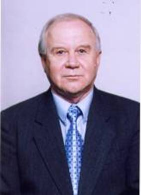 Воробйов Юрій Сергійович — академік АН вищої школи України